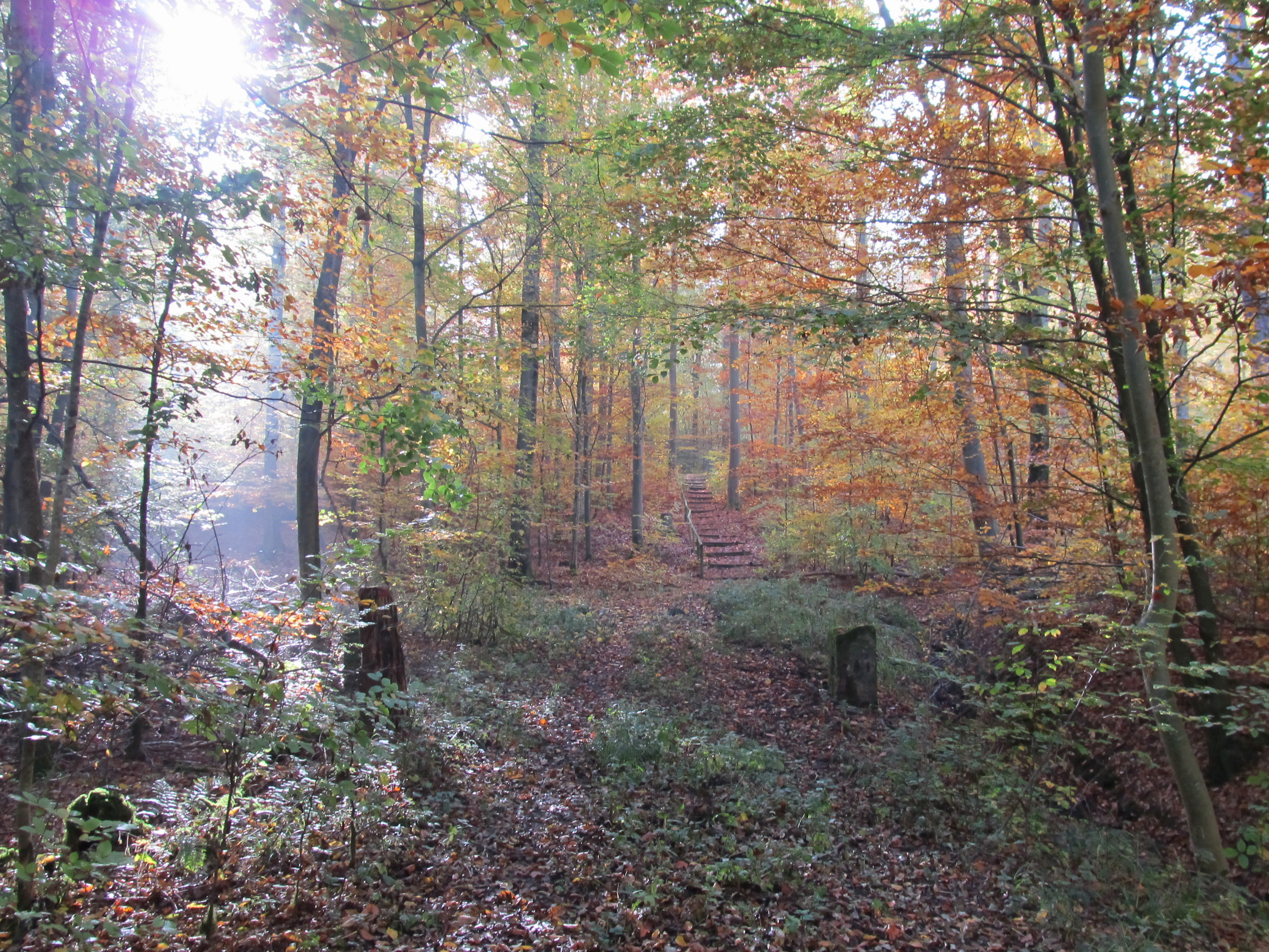 auf den Betzenberg im Naturpark Schönbuch, Deutschland